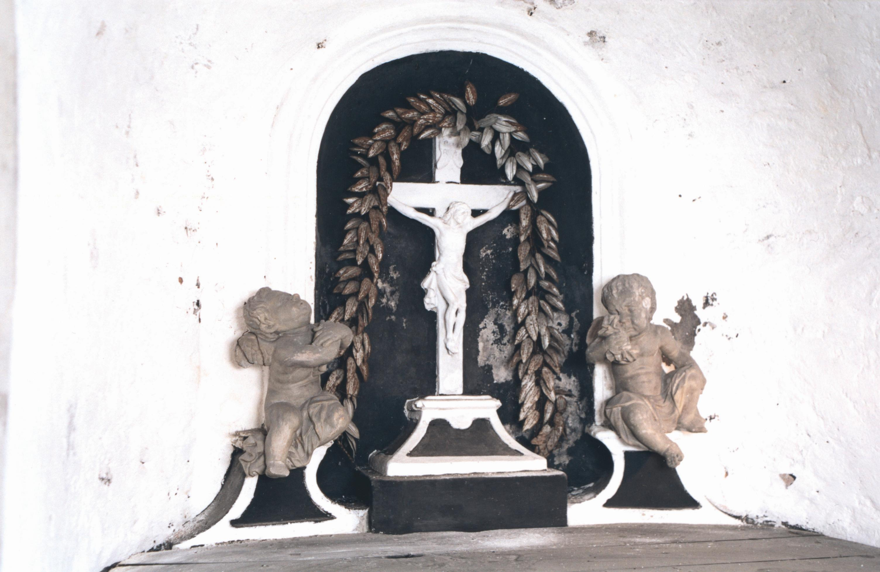 Oltar u kripti ispod crkve sv. Jurja u Petrovaradinu